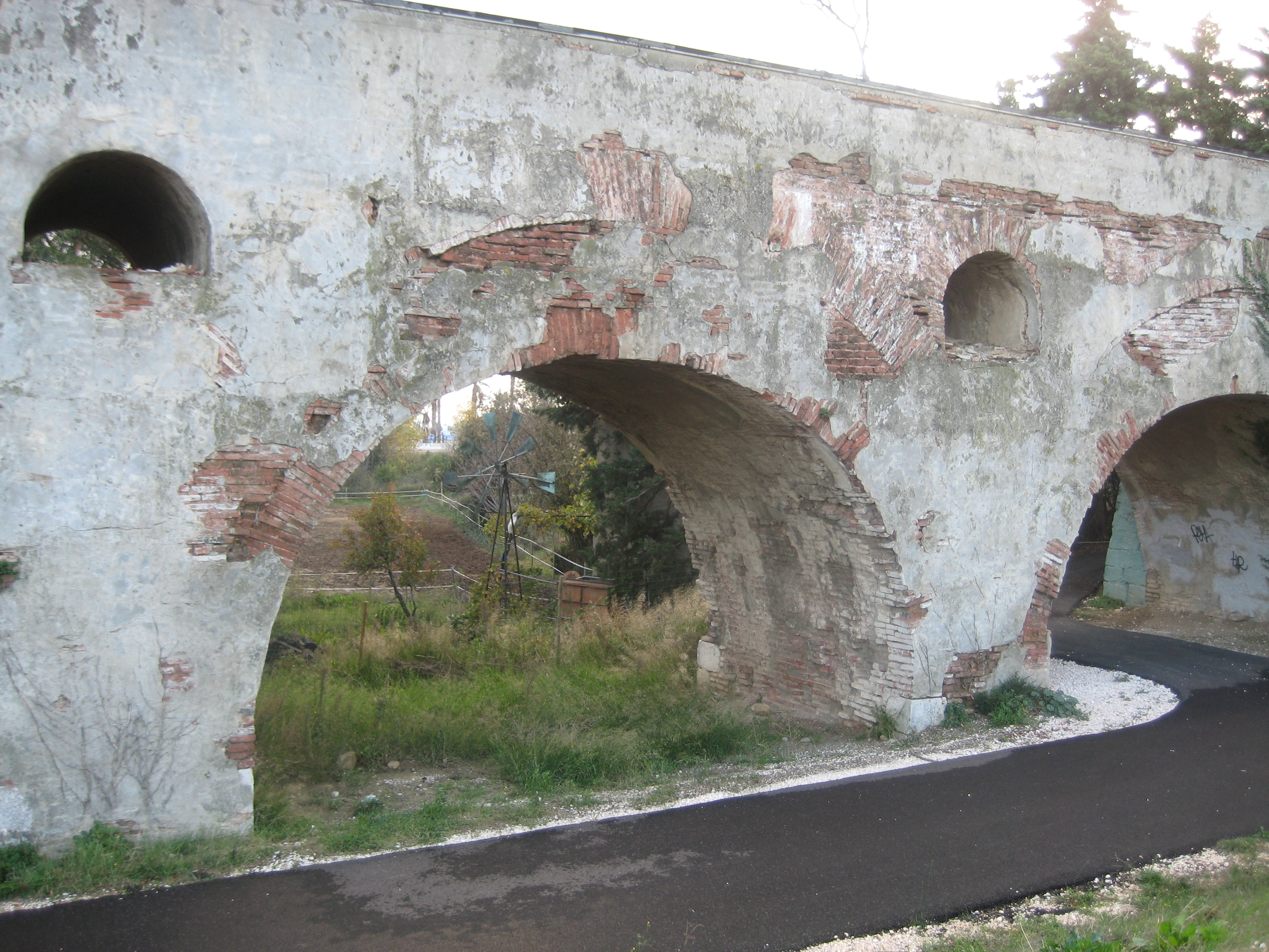 Aqueduc des arcades, Perpignan